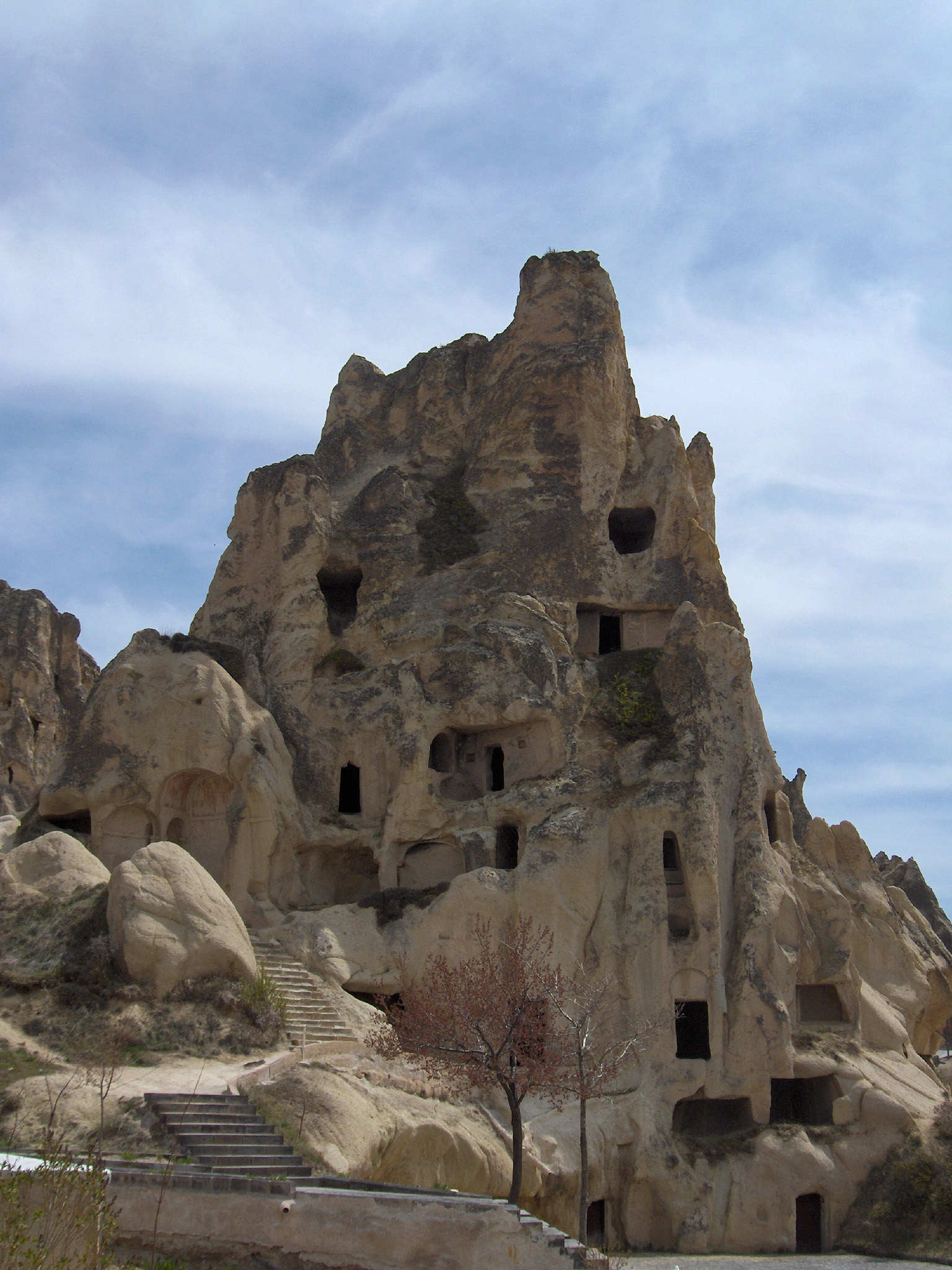 Göreme valley open air museum; Cappadocia, Turkey